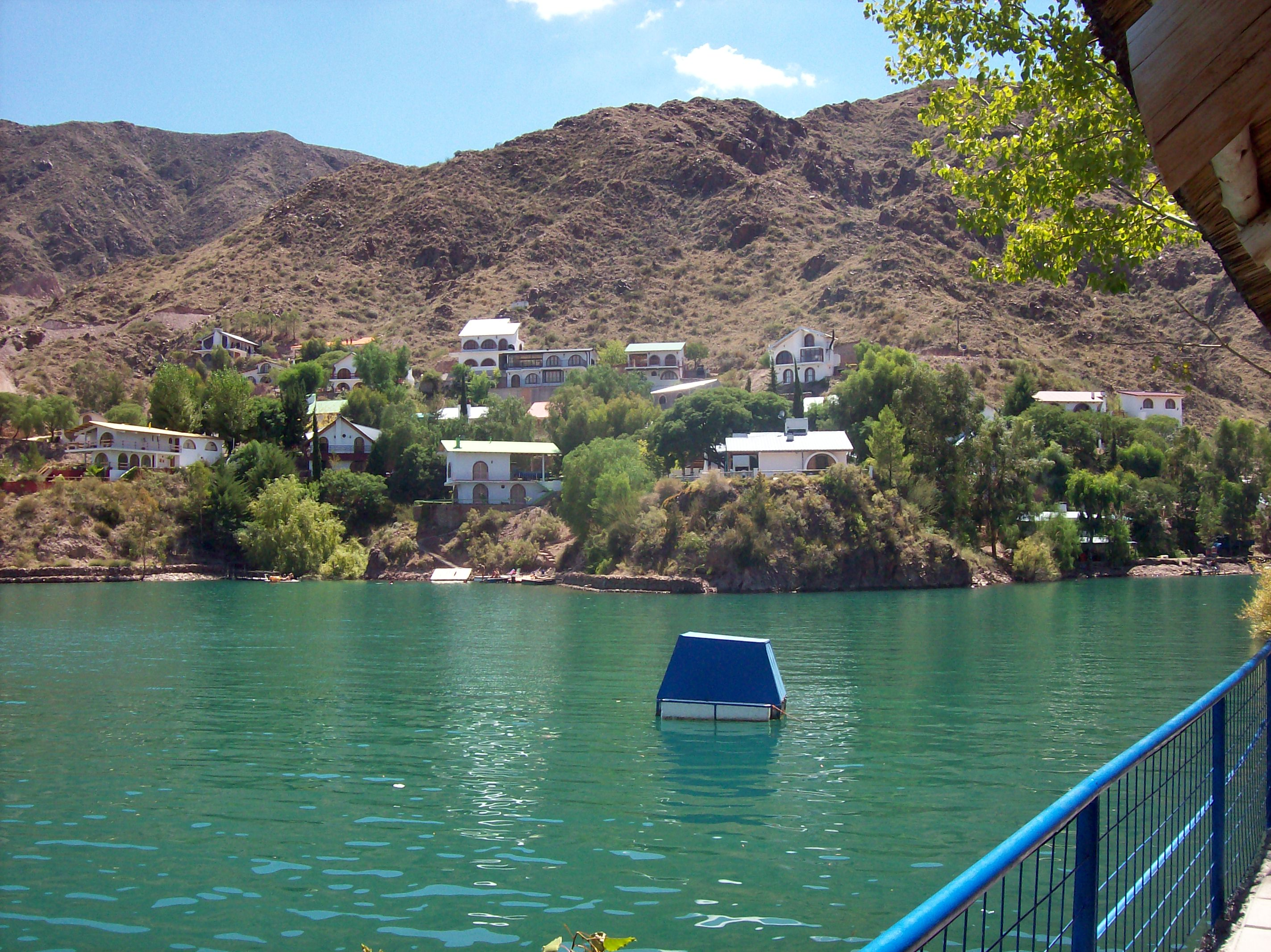 Embalse Los Reyunos en el depto de San Rafael en la provincia de Mendoza, Argentina.